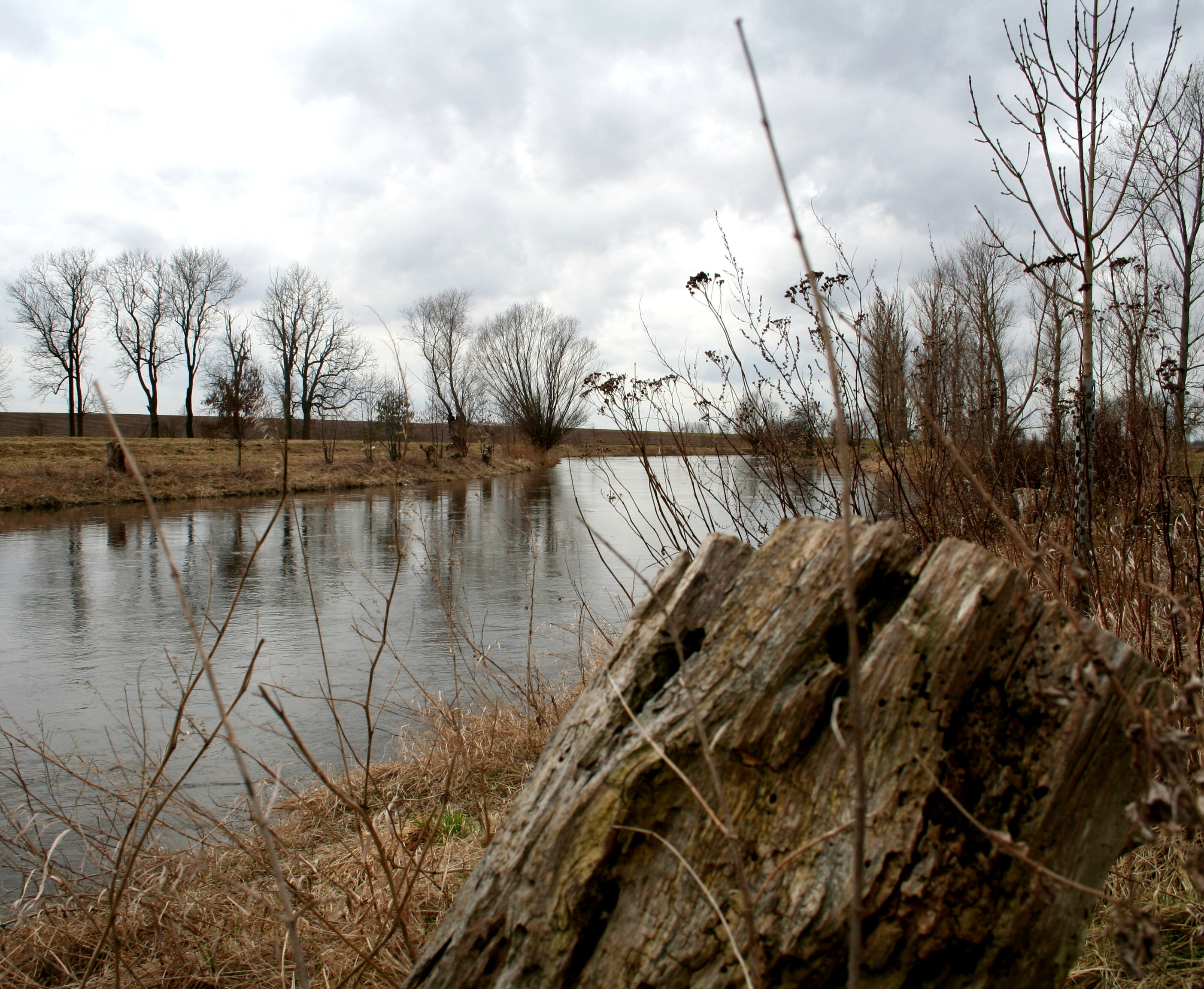 Der Fluss Bode in Staßfurt